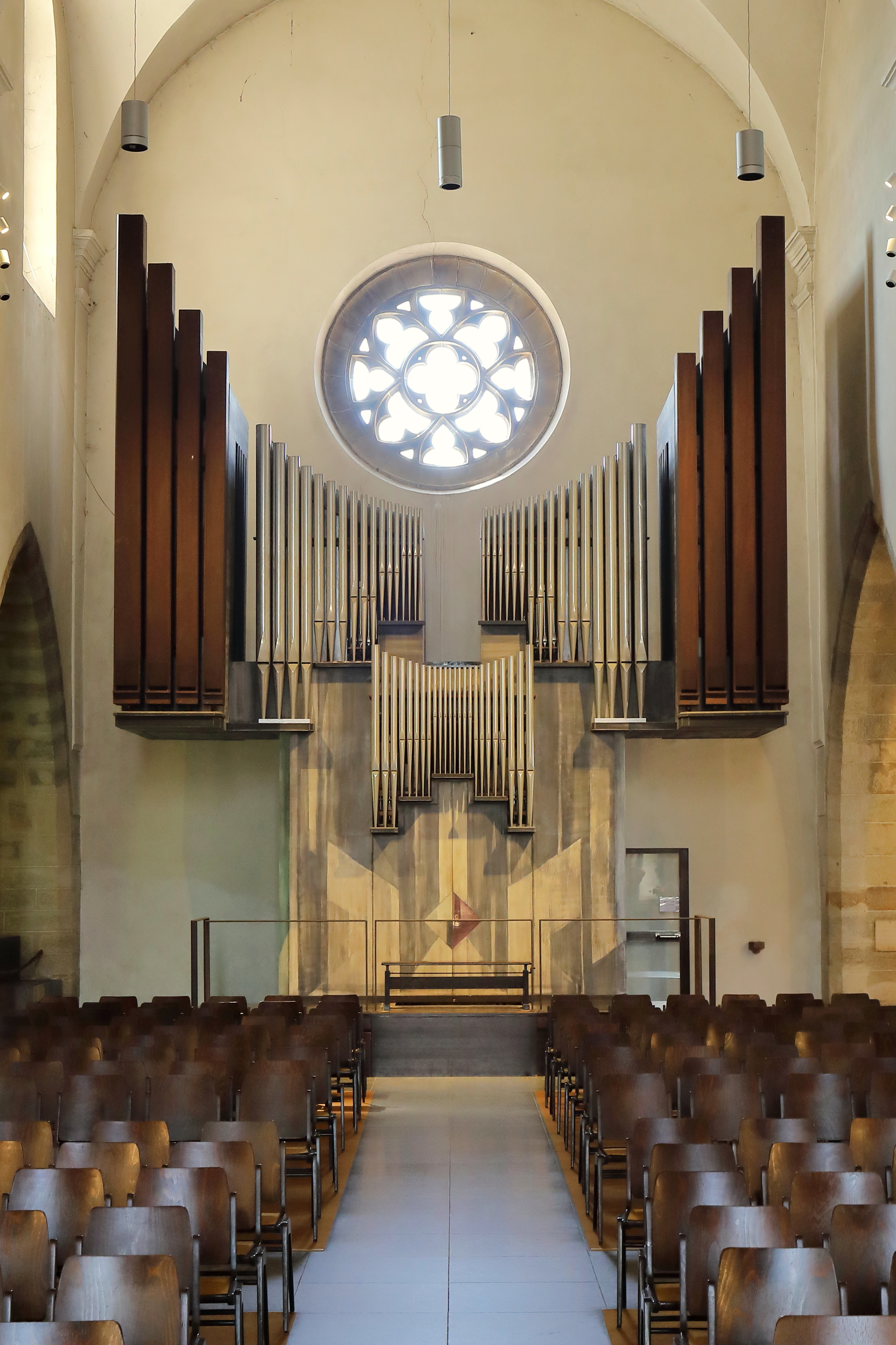 Orgel der röm.-kath. Pfarrkirche und Basilika St. Laurenz in der oberösterreichischen Stadt Enns. Die Orgel mit 25 Register sowie 1758 Pfeifen wurde von der OÖ. Orgelbauanstalt St. Florian gefertigt und am 11. Dezember 1976 geweiht.